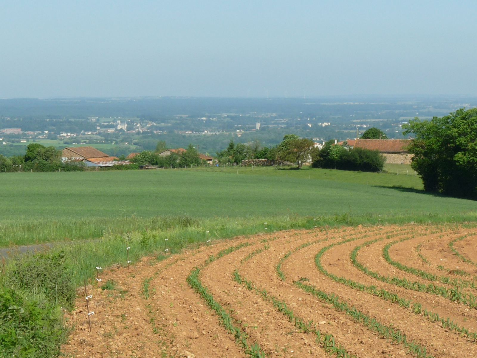 terre rouge et vue vers La Rochefoucauld (route d'Orgedeuil à Chasseneuil, près du Ménateau), Yvrac-et-Malleyrand, Charente, France